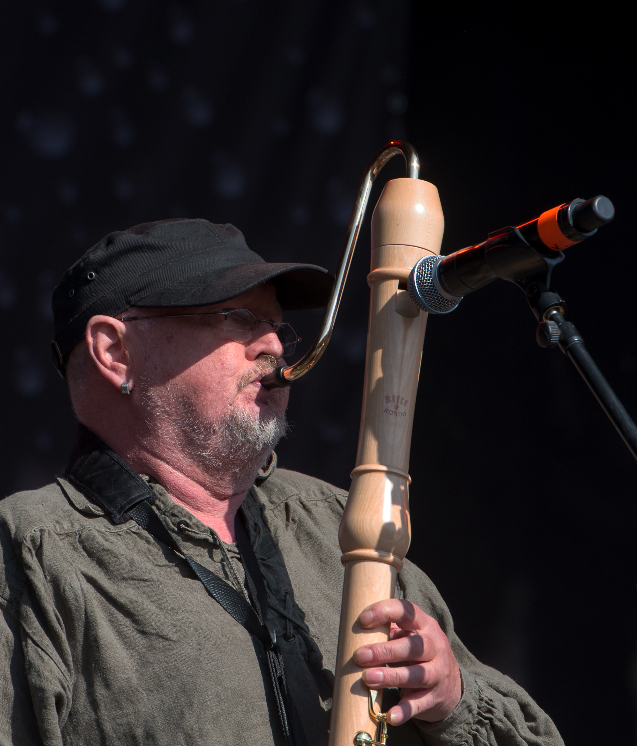 Klaus Büchner auf dem Reload Festival 2018